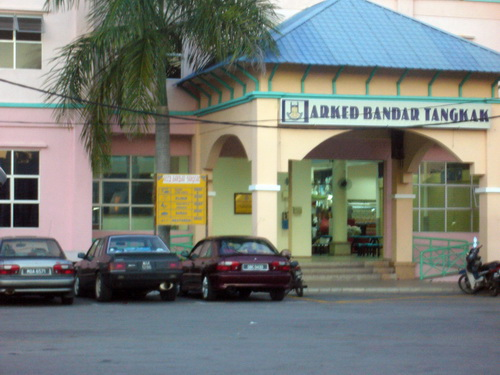 Arked Bandar Tangkak